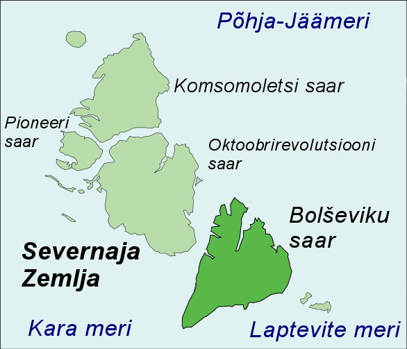 Bolševiku saare asukoht